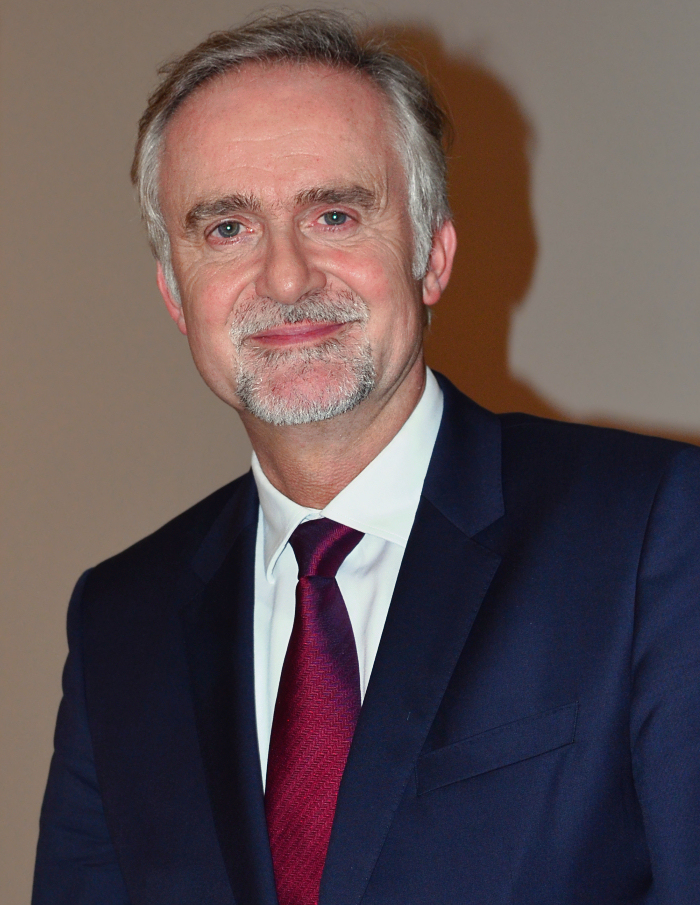 Wolfgang Griesert bei der Vorstellung des Kupferschatzes von Osnabrück